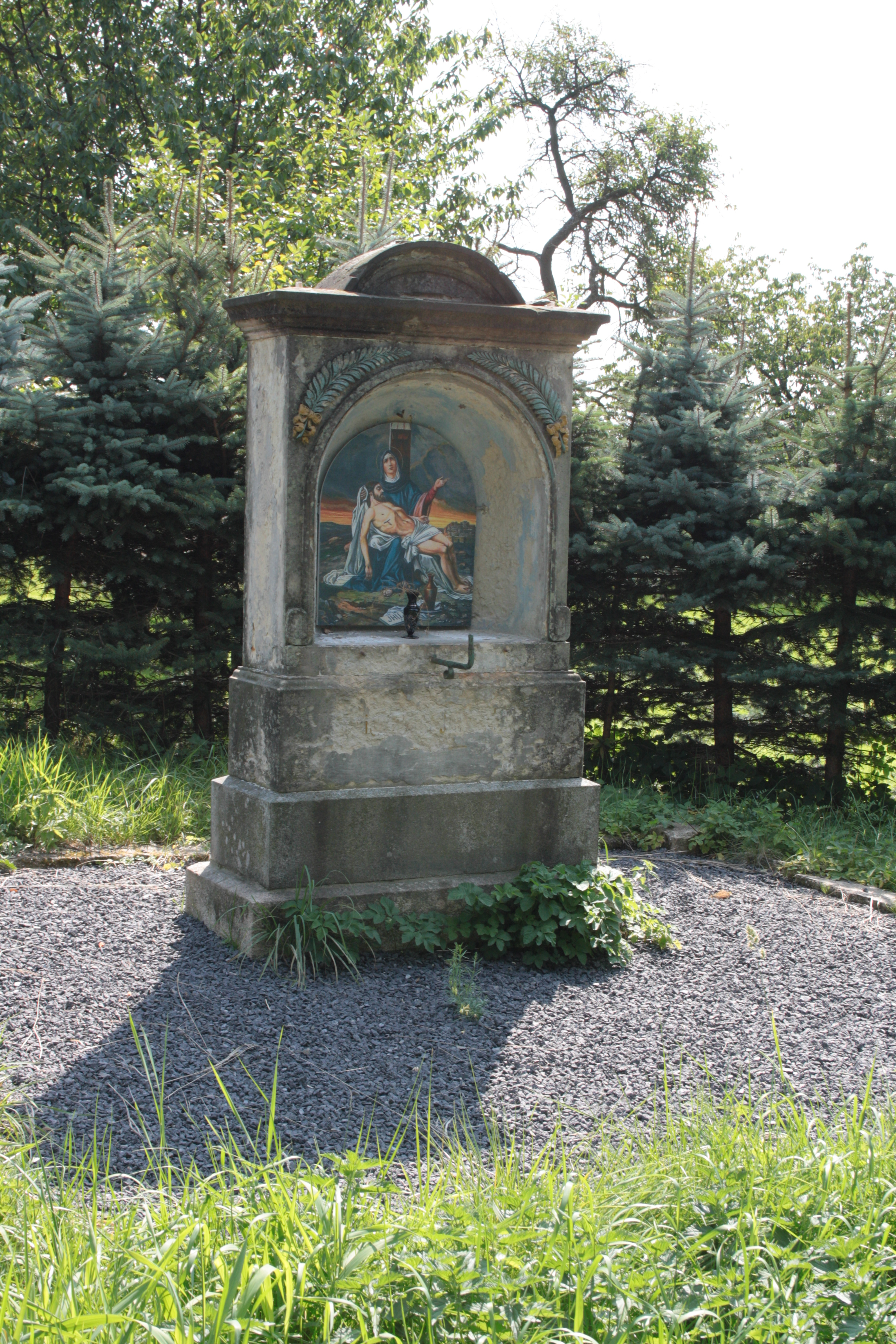 This photograph was taken with a DSLR from WMCZ's Camera grant. Výklenková kaplička v Krásném Lese v Libereckém okrese.